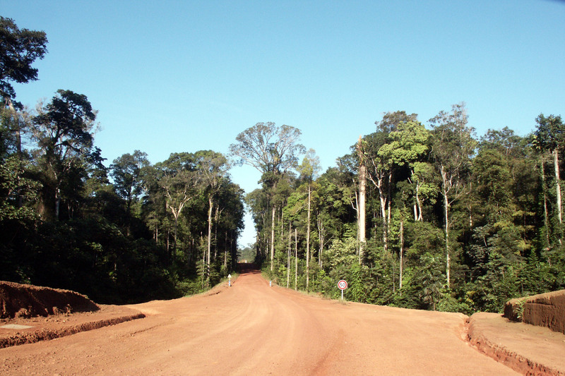 Description:La RN2 (de Cayenne à Saint-Georges-de-l'Oyapock) lors de sa contruction se présentait comme une piste forestière Sources:Didwin